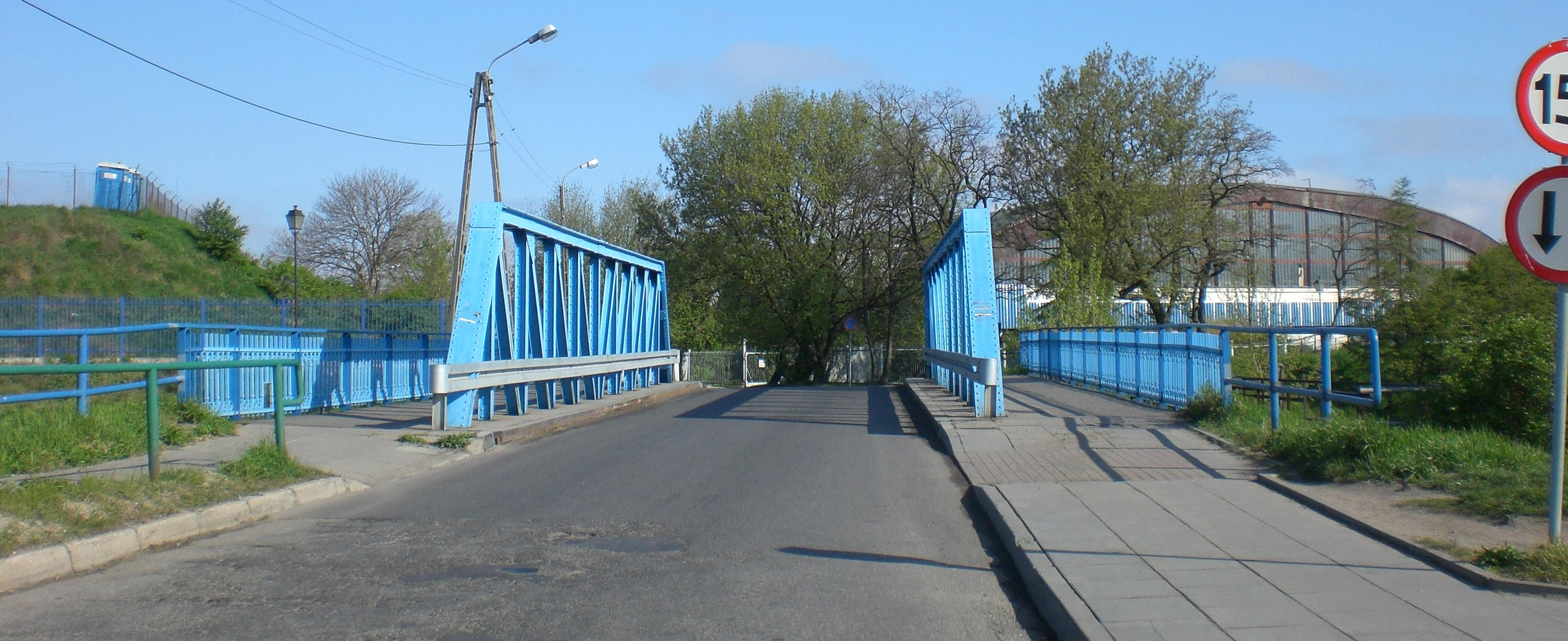 Gdańsk Olszynka, na granicy z Dolnym Miastem. Most Kapuściany nad Opływem Motławy (do 1974 prowadziła tędy trasa GKD).